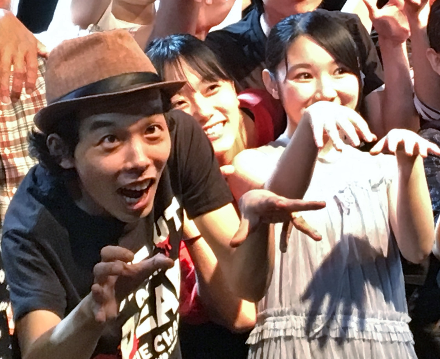 「上田慎一郎×ふくだみゆき 夫婦（めおと）監督傑作選」フォトセッション（2018年8月8日、LOFT9 Shibuya） 左から上田慎一郎（「たまえのスーパーはらわた」監督）、工藤綾乃、白石優愛（「たまえのスーパーはらわた」出演者）